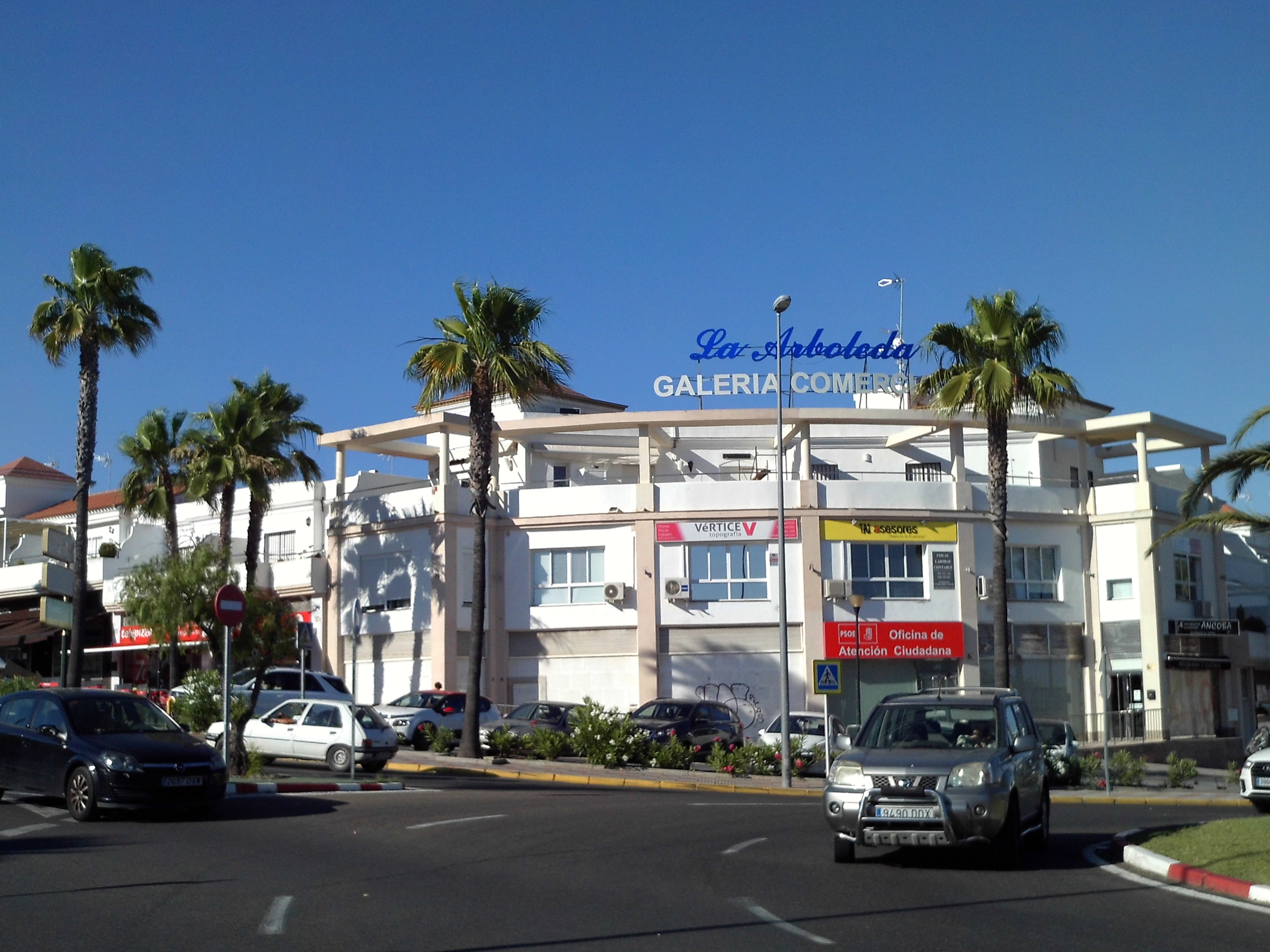 Galería Comercial La Arboleda. Tomares, provincia de Sevilla, Andalucía, España.